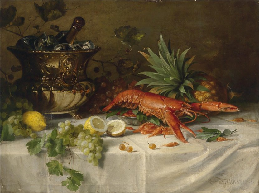 Stillleben mit Hummer